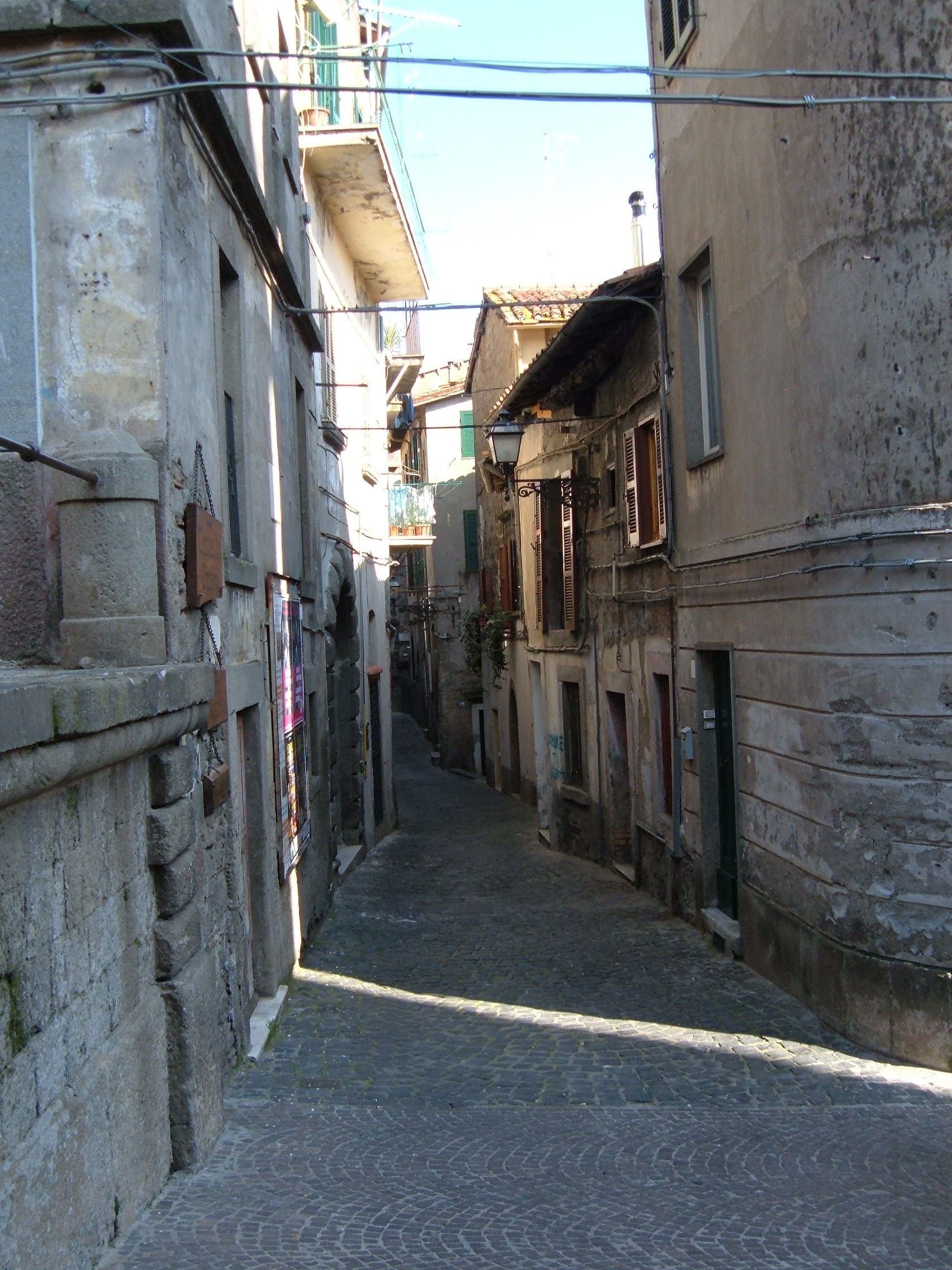 Soriano nel Cimino, provincia di Viterbo. Strada.